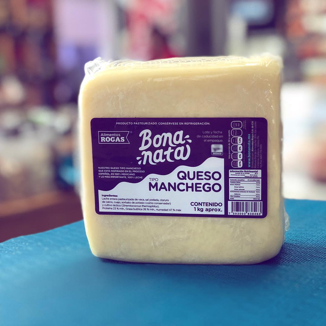 Queso mexicano tipo manchego de la marca Bona Nata